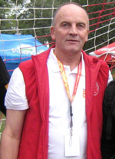 Piotr Mowlik (ur. 21 kwietnia 1951 w Rybniku) - piłkarz polski grający na pozycji bramkarza